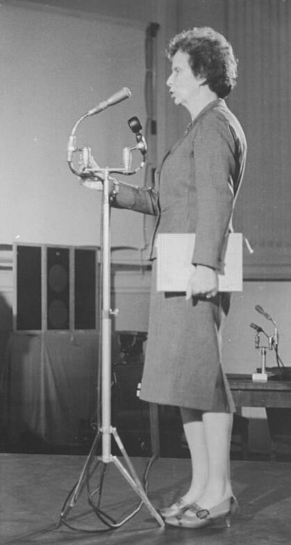 Zentralbild Brüggmann 12.7.1963 1. Strafsenat setzte Verhandlung gegen Globke fort. Der 1. Strafsenat des Obersten Gerichts der DDR setzte am 11. Juli 1963 die Hauptverhandlung gegen den millionenfachen Judenmörder Globke fort. Im Mittelpunkt steht der Komplex der berüchtigten "Endlösung der Judenfrage". Wie am Vortage sagten zahlreiche Zeugen aus, die die faschistische Judenverfolgung am eigenen Leibe erlebten. UBz: Die Zeugin, die Juristin Gertruda Sekaninová-Čakrtová aus Prag, Überlebende von Theresienstadt, Auschwitz und Kurzbach, die ihre Angehörigen im Holocaust verlor.